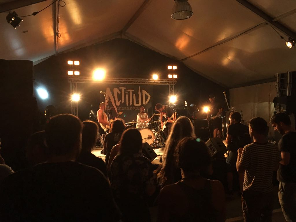 Actitud Fest